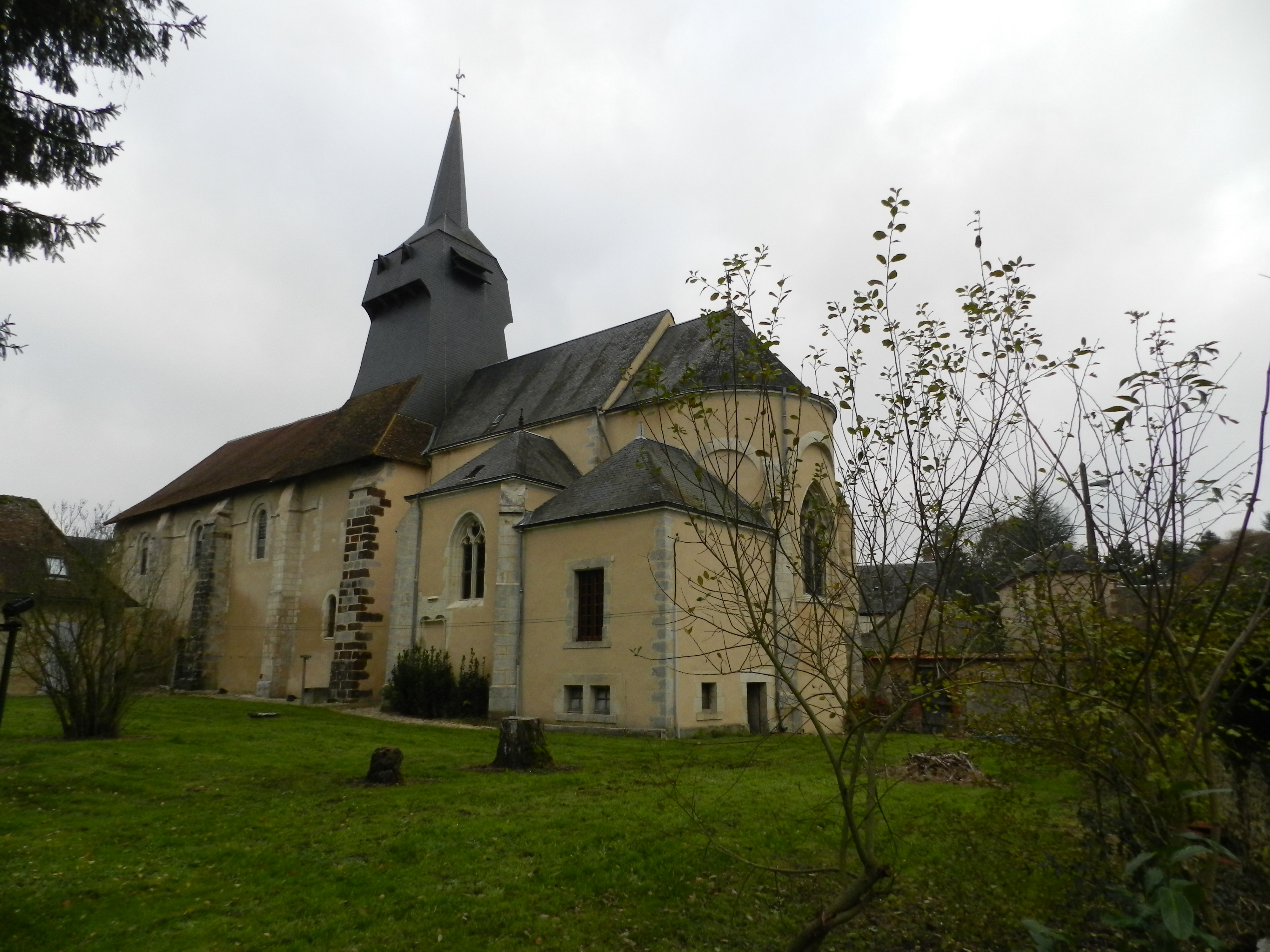 Notre église, inscrite à l'inventaire des monuments historiques.